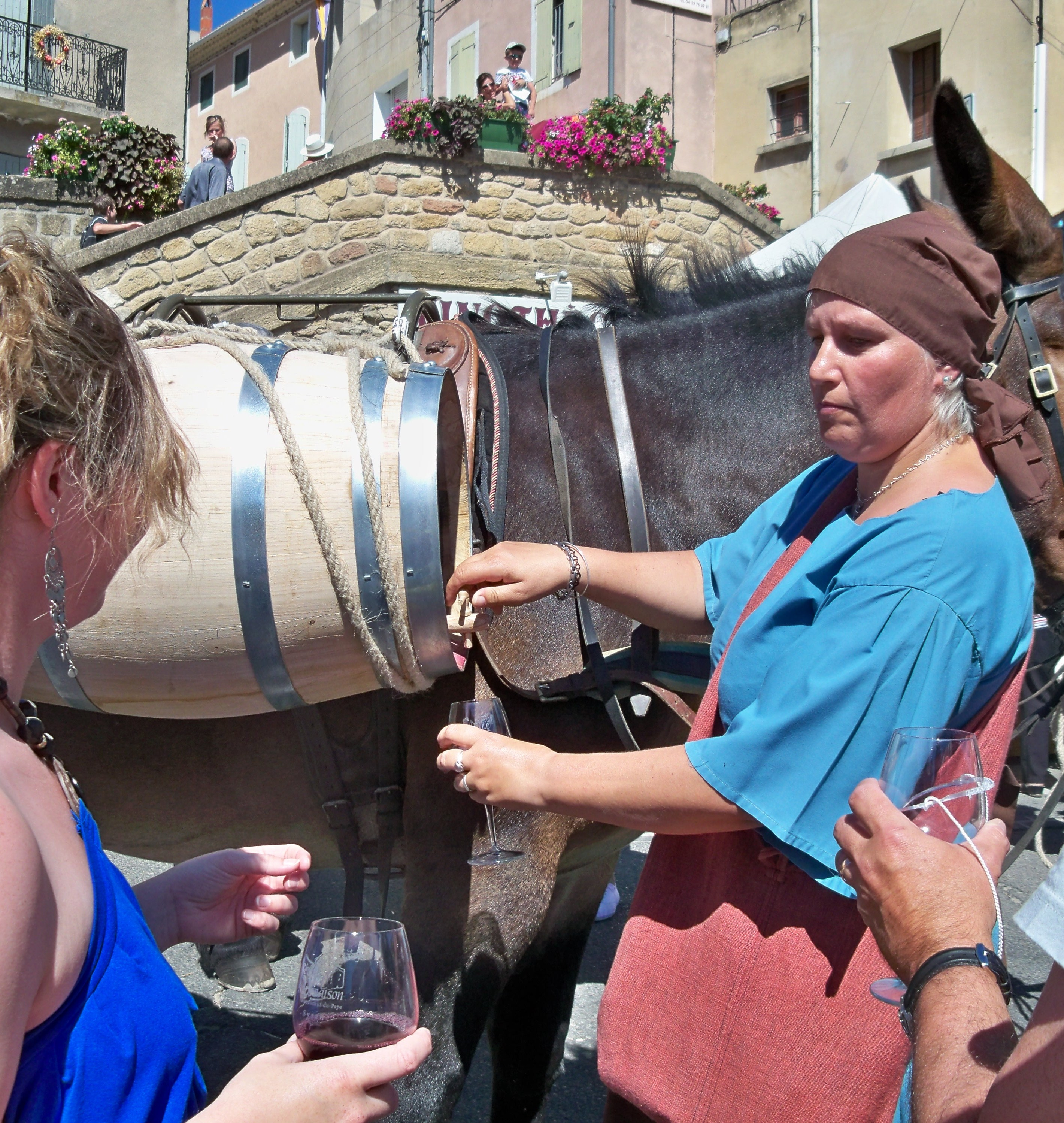 Fêtes de la Véraison, à Chateauneuf du Pape, Vaucluse, France